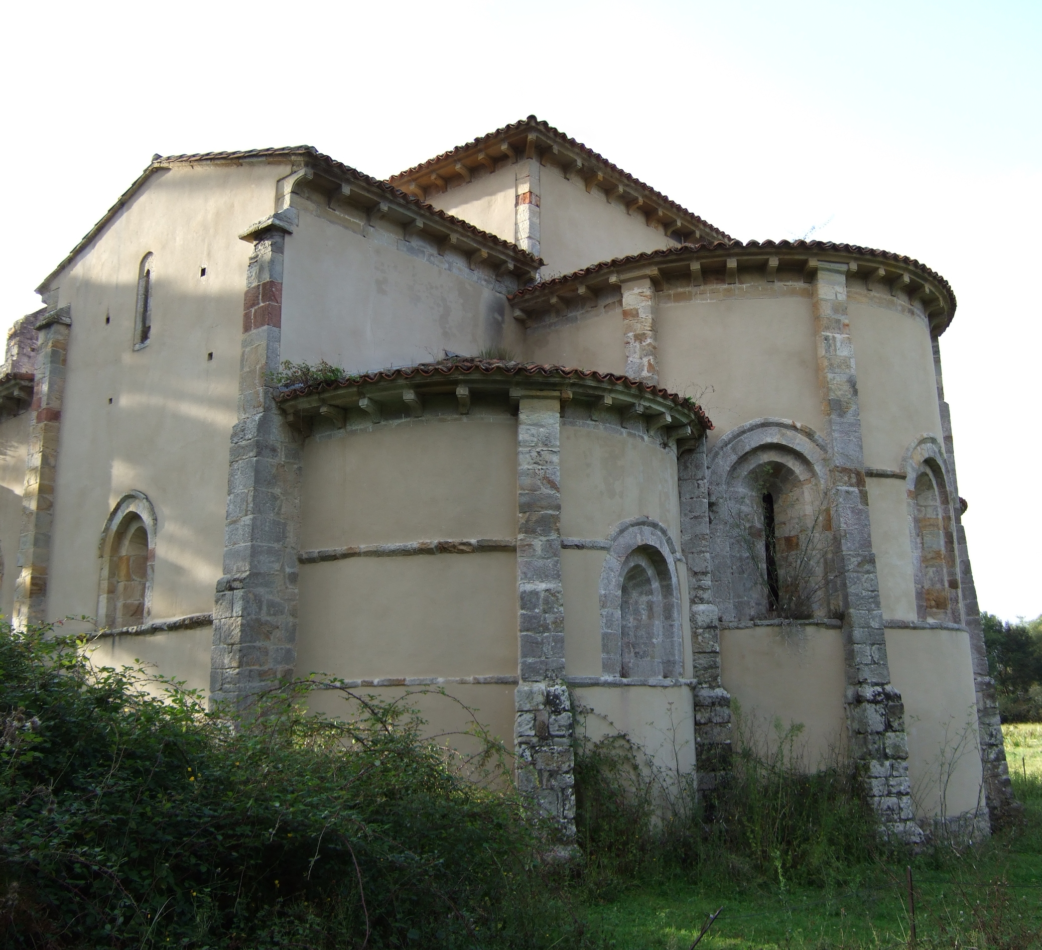 Monasterio de San Antolín de Bedón, concejo de Llanes, Asturias. - Ábsides